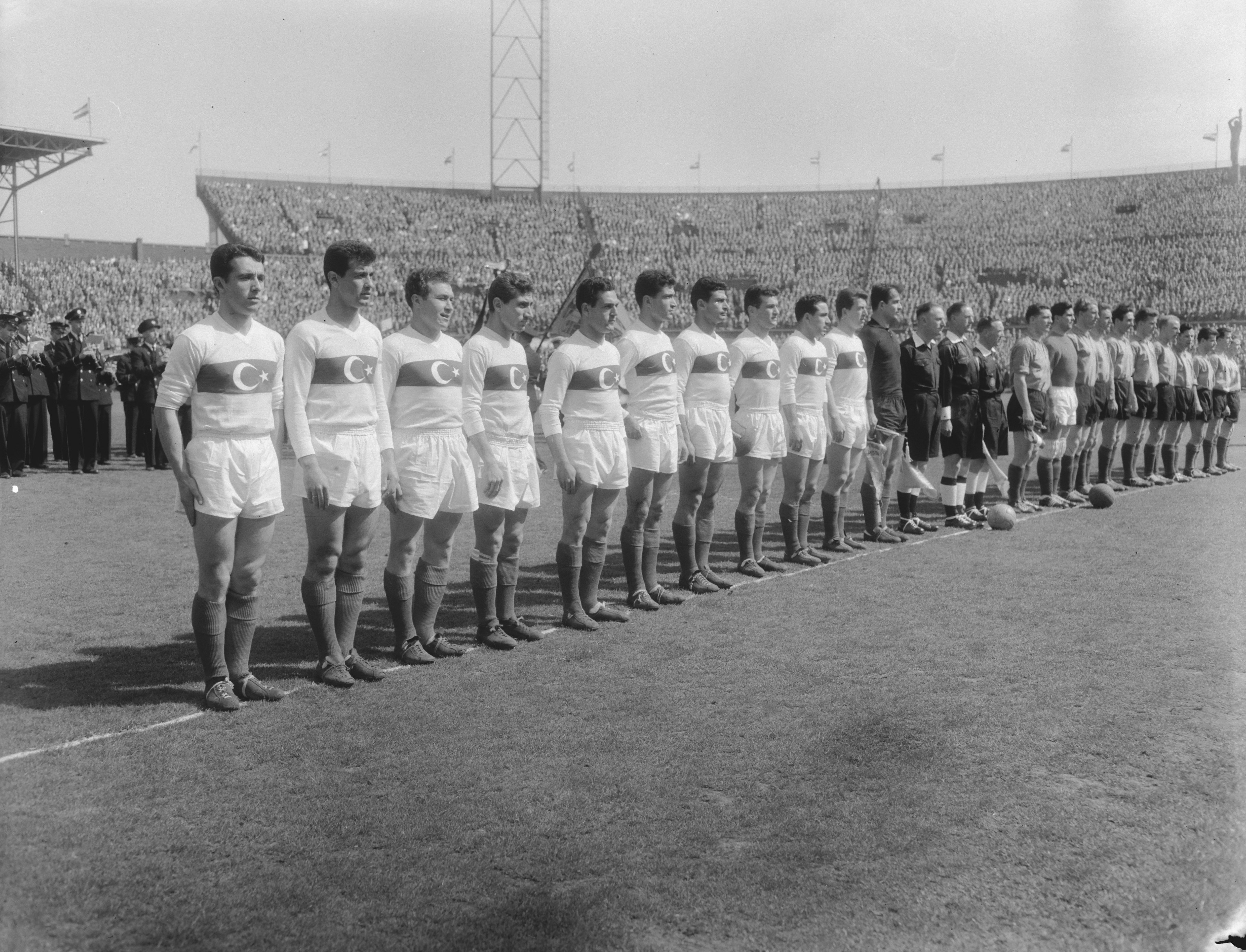 Collectie / Archief : Fotocollectie Anefo Reportage / Serie : [ onbekend ] Beschrijving : Voetbal Nederland tegen Turkije in het Olympisch stadion. Elftallen Datum : 4 mei 1958 Locatie : Amsterdam, Noord-Holland Trefwoorden : groepsportretten, interlands, sport, voetbal Instellingsnaam : Olympisch Stadion Fotograaf : Pot, Harry / Anefo Auteursrechthebbende : Nationaal Archief Materiaalsoort : Negatief (zwart/wit) Nummer archiefinventaris : bekijk toegang 2.24.01.04 Bestanddeelnummer : 909-5589